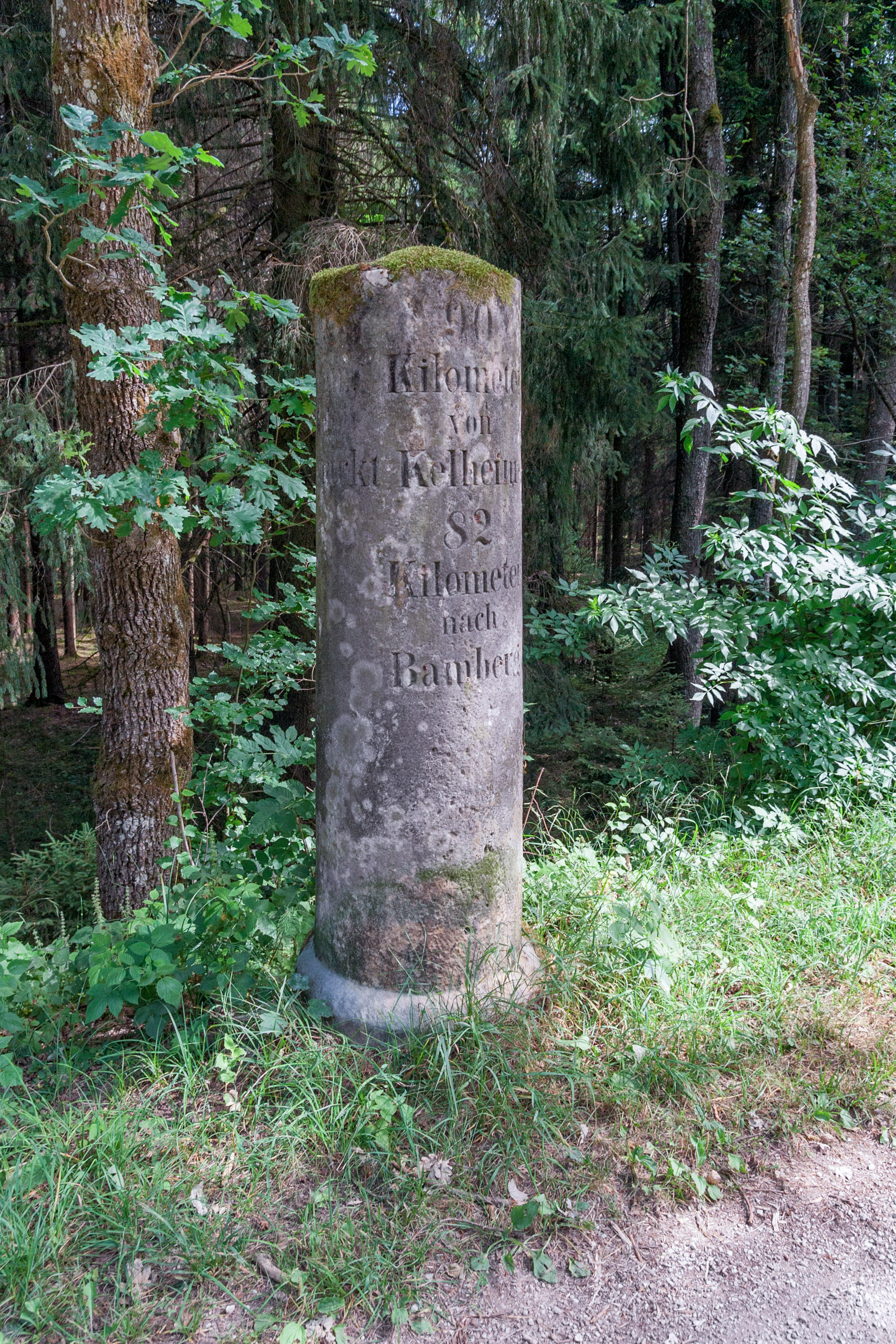 Treidelsteine des Ludwig-Donau-Main-Kanal, Treidelstein, KM 90